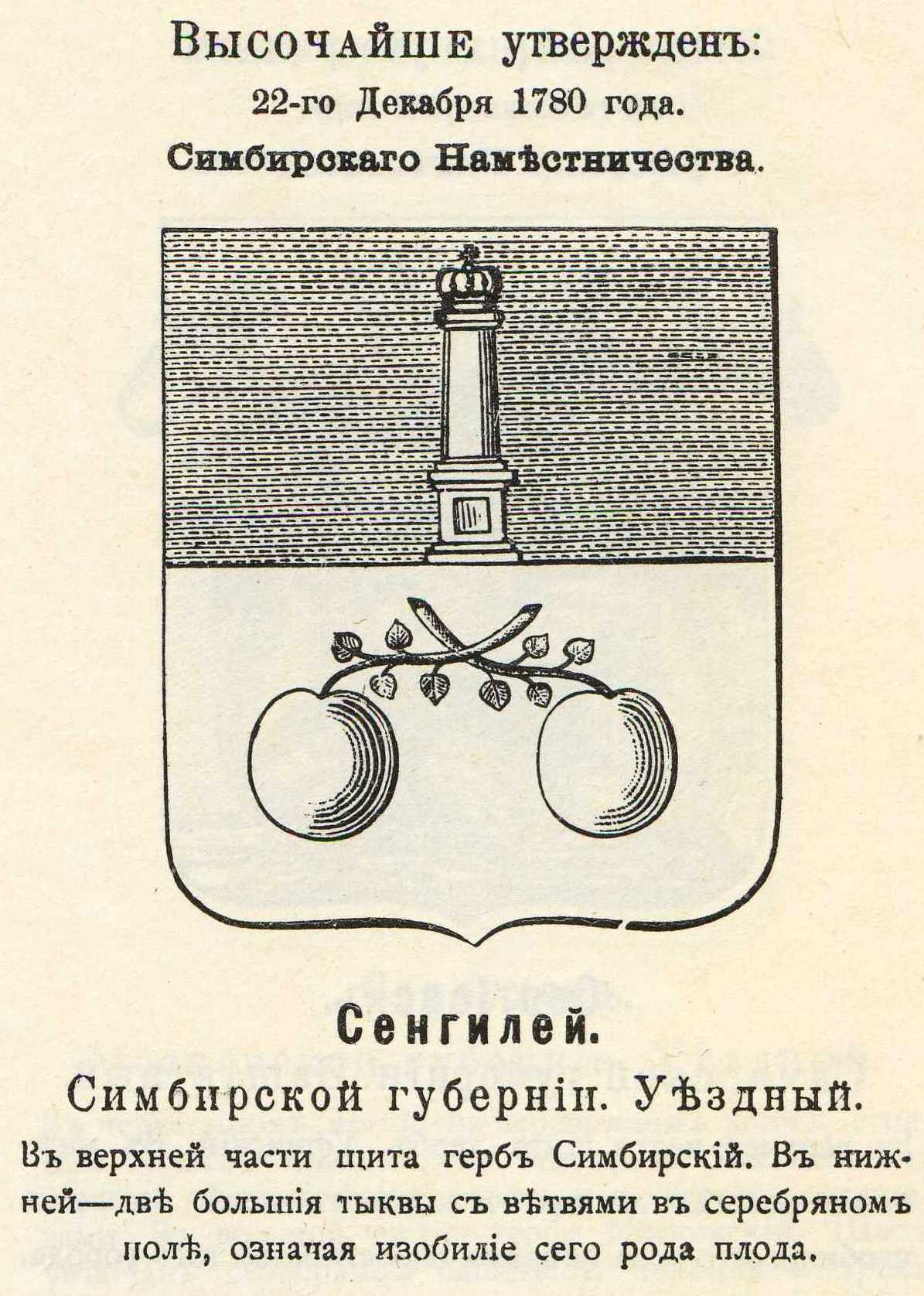 Official Russian Empire coat of arms Sengilei. Герб Российской Империи уездного города Сенгилей Симбирской губернии с официальным описанием в Гербовнике Винклера.